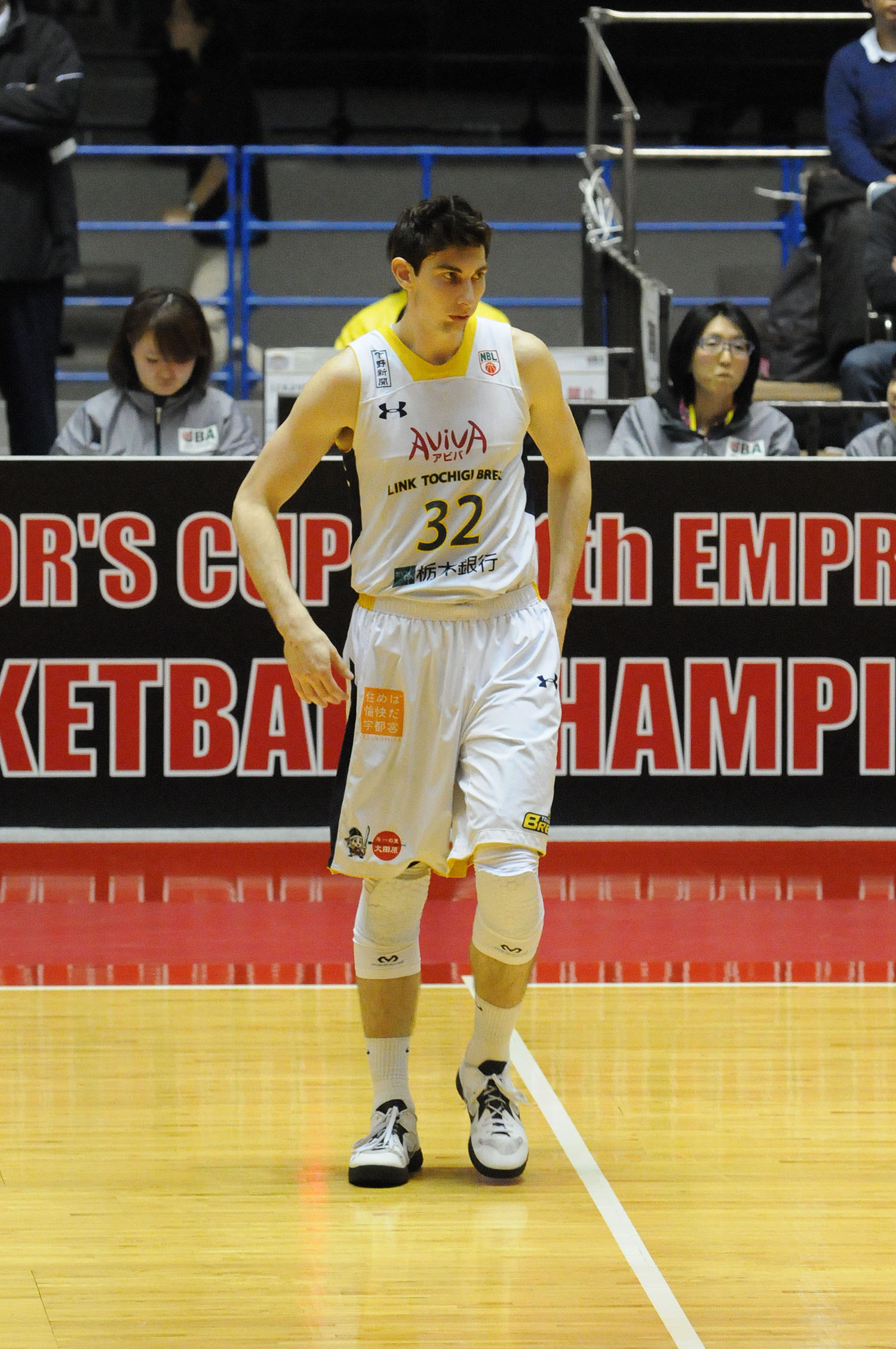 リンク栃木ブレックス、ライアン・ロシター選手。代々木第一体育館で。